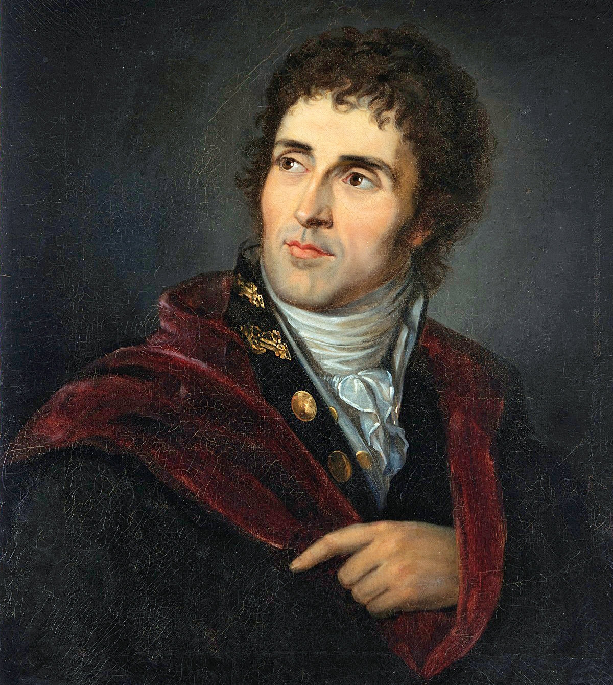 UT160715AT283Parroti portree saabumine ajalooline sündmus. Portree osteti ülikoolile Kanadast Parroti 250. sünniaastapäevaks.Ülikooli 18Foto Andres Tennus/Tartu ÜlikoolTÜ kunstimuuseum